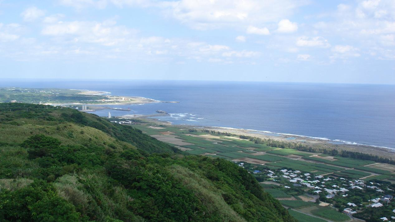 A view from Hyakunodai, Kikai Island, Japan.